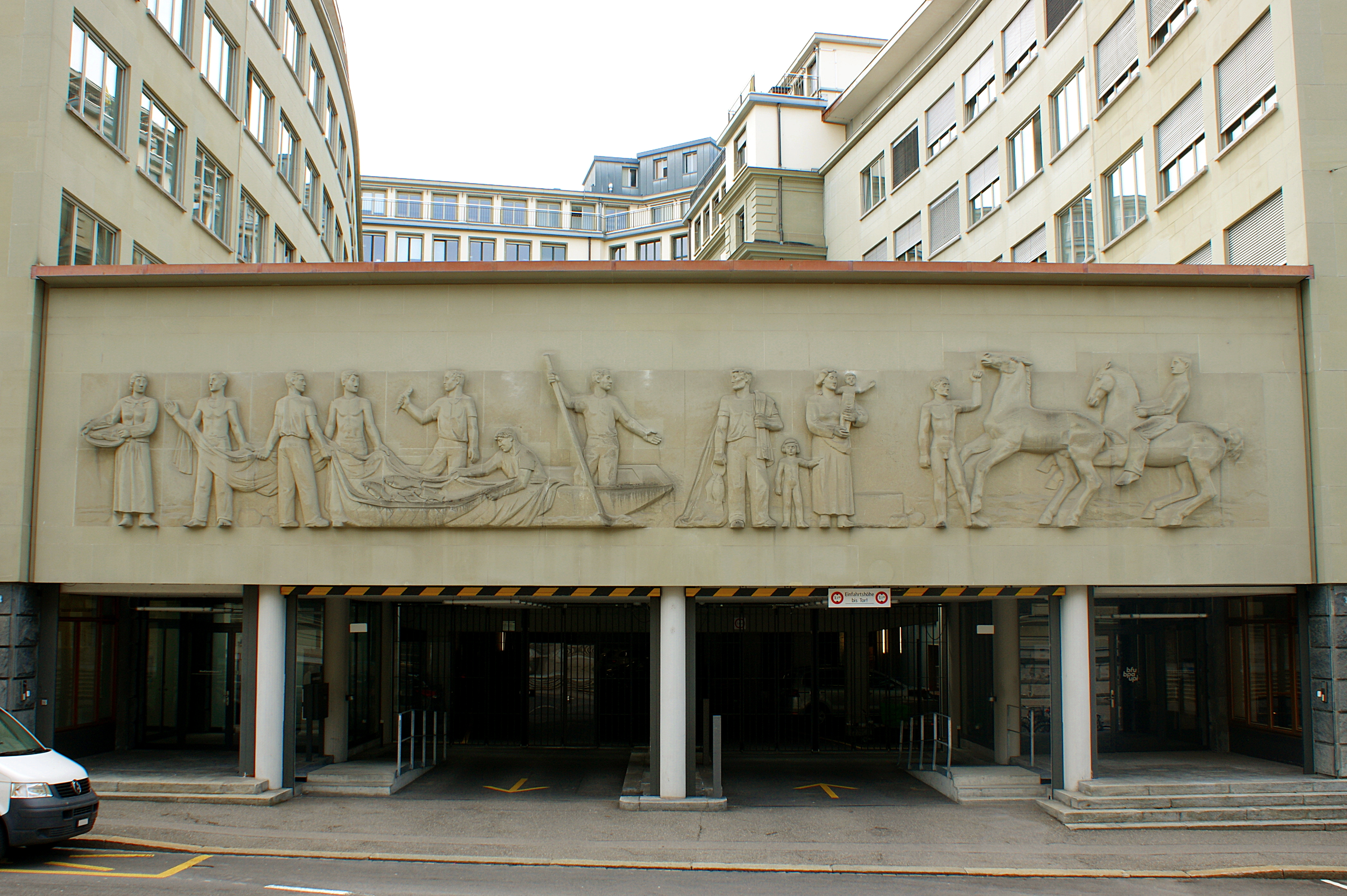 Sandsteinhochrelief Fischer und Familie (Luigi Zanini 1945)